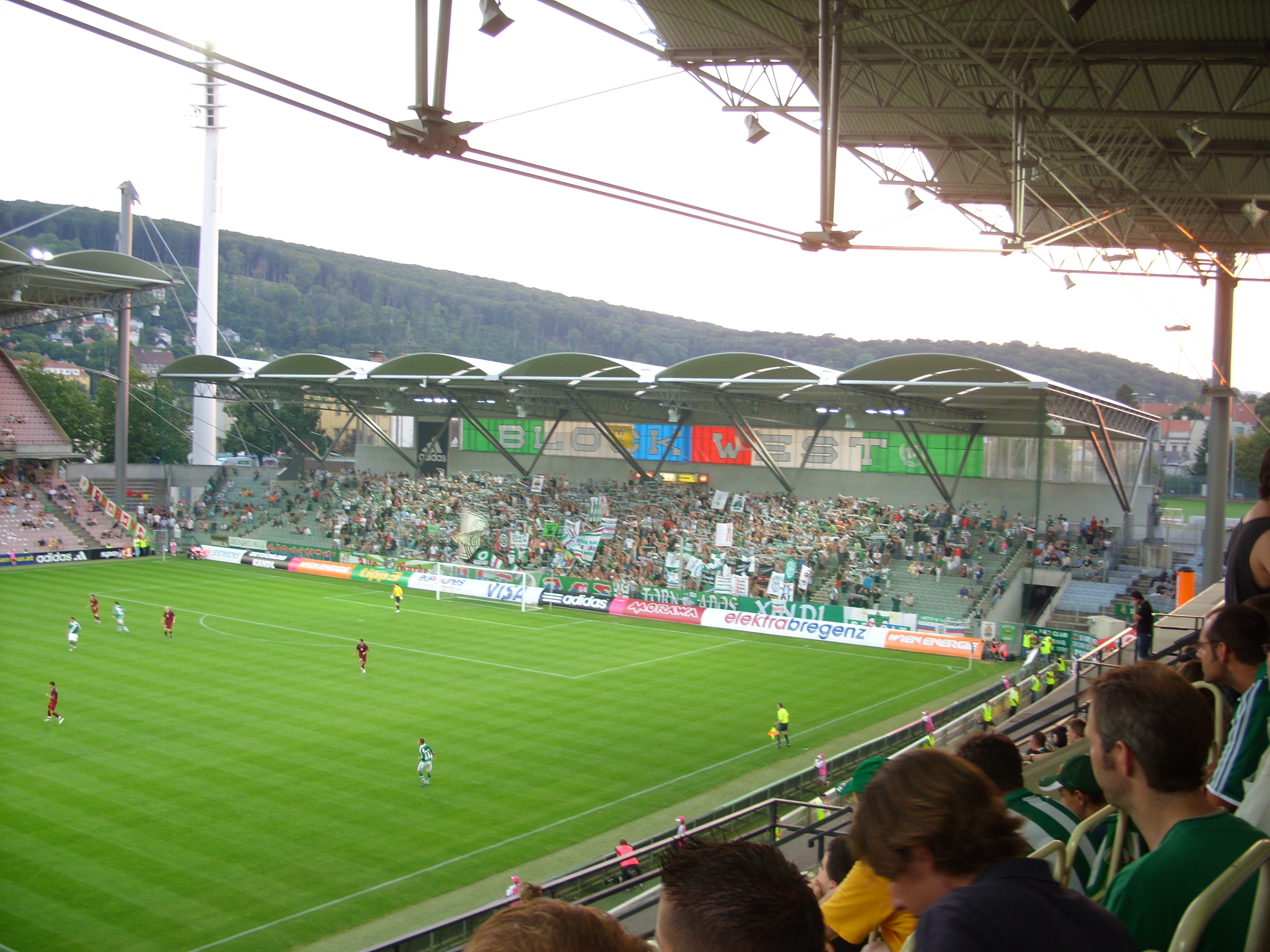 Schalparade auf der Westtribüne des Gerhard-Hanappi-Stadions vor dem Spiel Rapid - Rubin Kazan (21.07.2007)